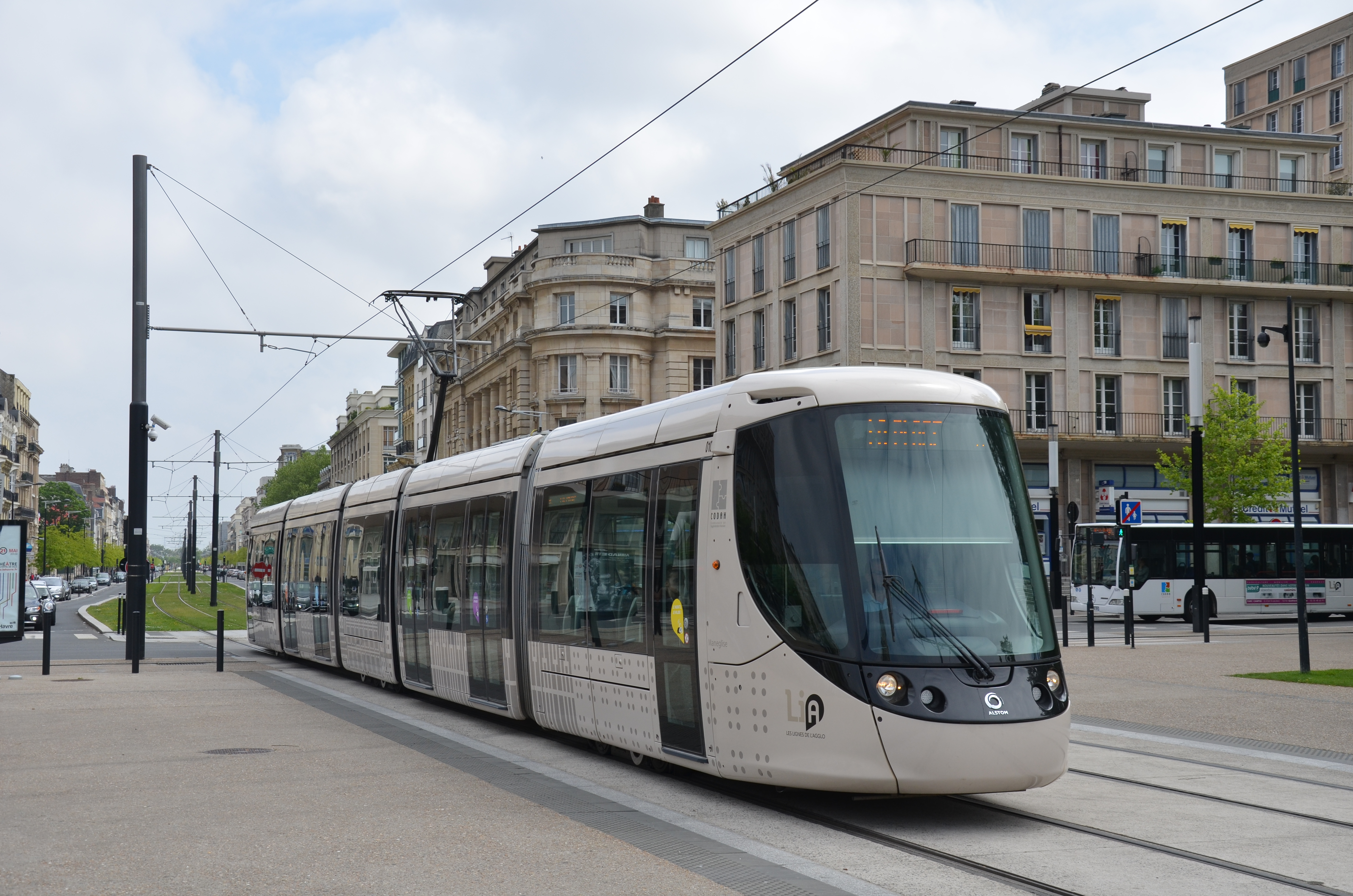 Alstom Citadis 302 n°010 de la ligne B du tramway du Havre, à l'approche de la station Hôtel de Ville.